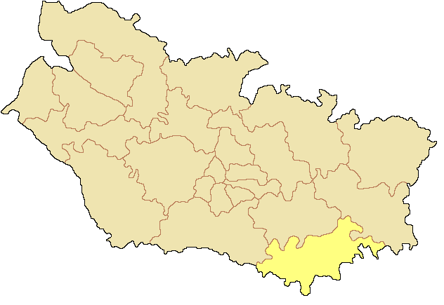 Canton de Roye dans le département de la Somme